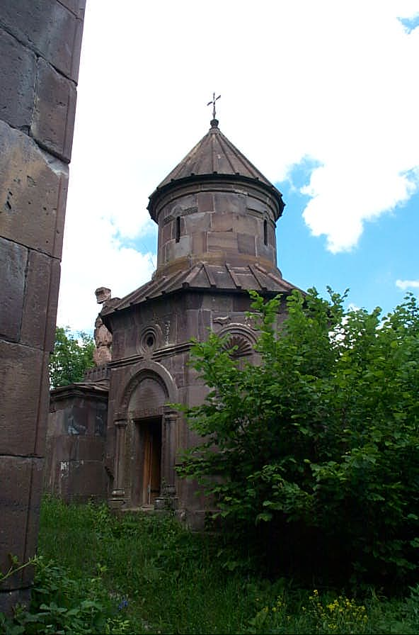 Makaravank Monastery in Armenia.